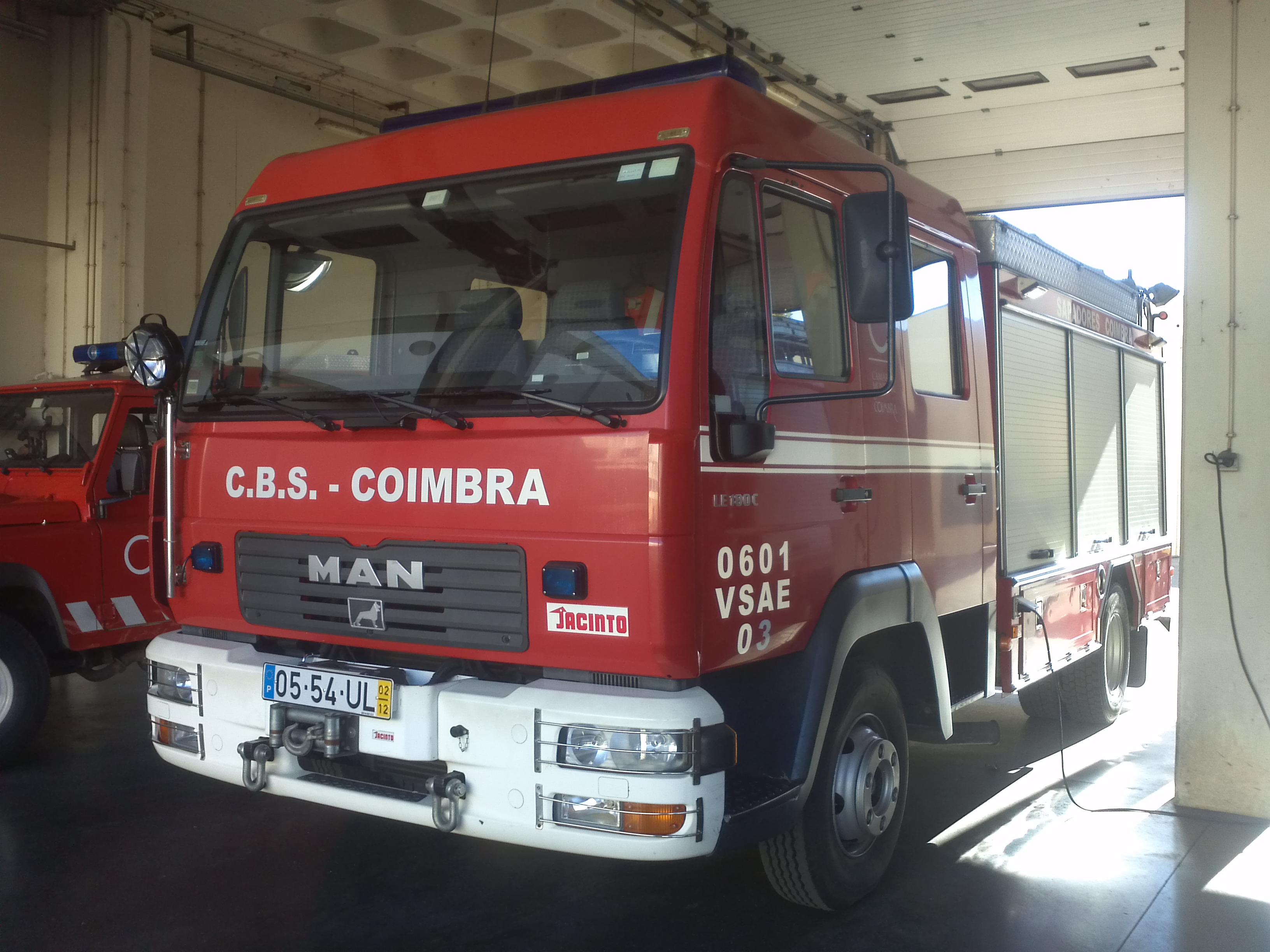 Veiculo de Socorro e Assistência Especial 03